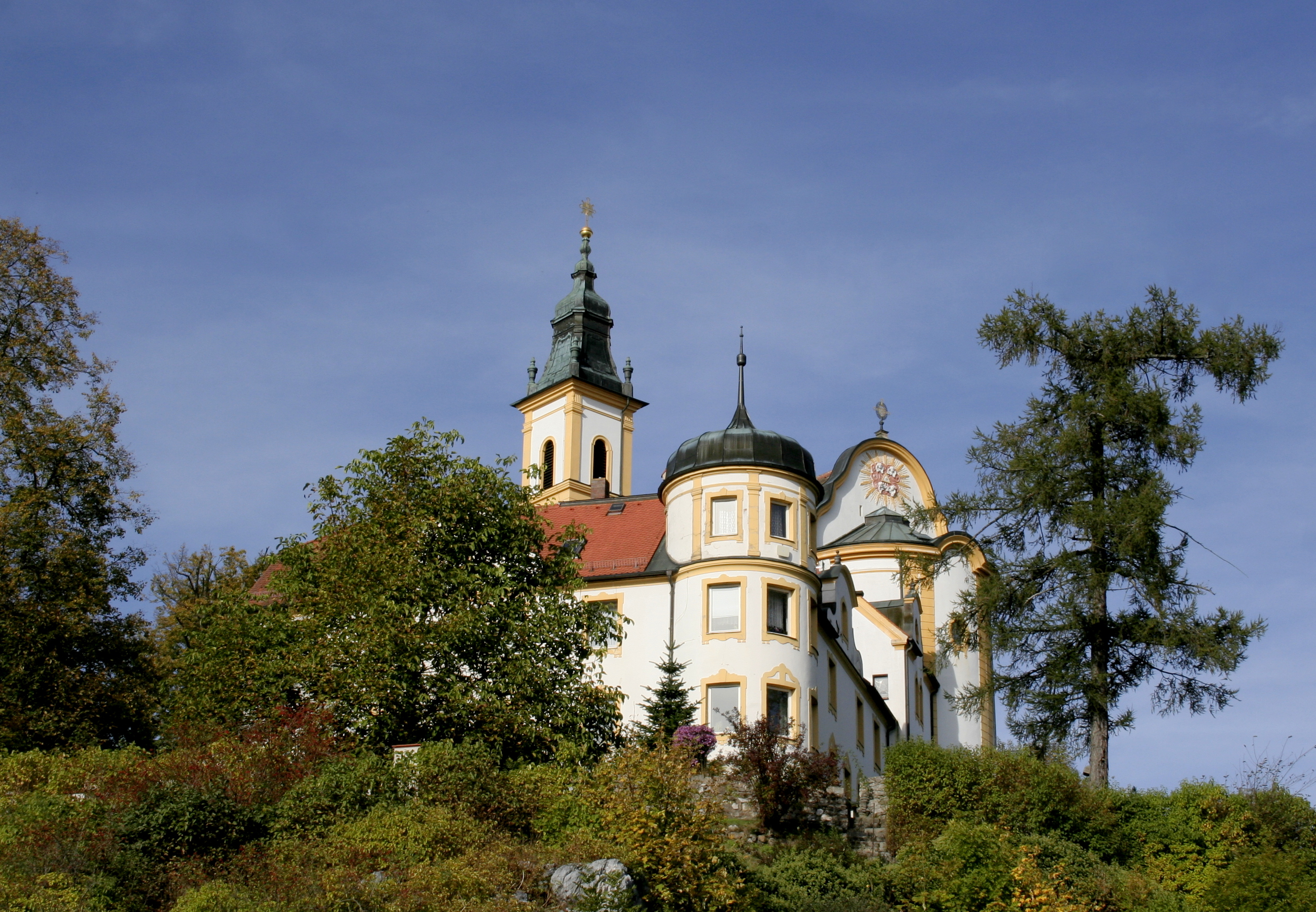 Baudenkmal Deutschland; Bayern; Oberpfalz; Neustadt a.d.Waldnaab; Pleystein; Kath. Wallfahrtskirche Hl. Kreuz, Kloster, mehrflügelige zweigeschossige Anlage mit Walmdächern und neubarocken Gliederungen, runder Eckturm nach Süden mit Glockenhaube, 1901-1903 von Heinrich Hauberrisser und Joseph Koch; mit Ausstattung; Hofeinfriedung nach Süden und einen Gebäudezwickel abschließend, durch Pfeiler gegliederte Stufenmauer, Rundbogenportal mit Schweifgiebel, wohl gleichzeitig.This is a photograph of an architectural monument.